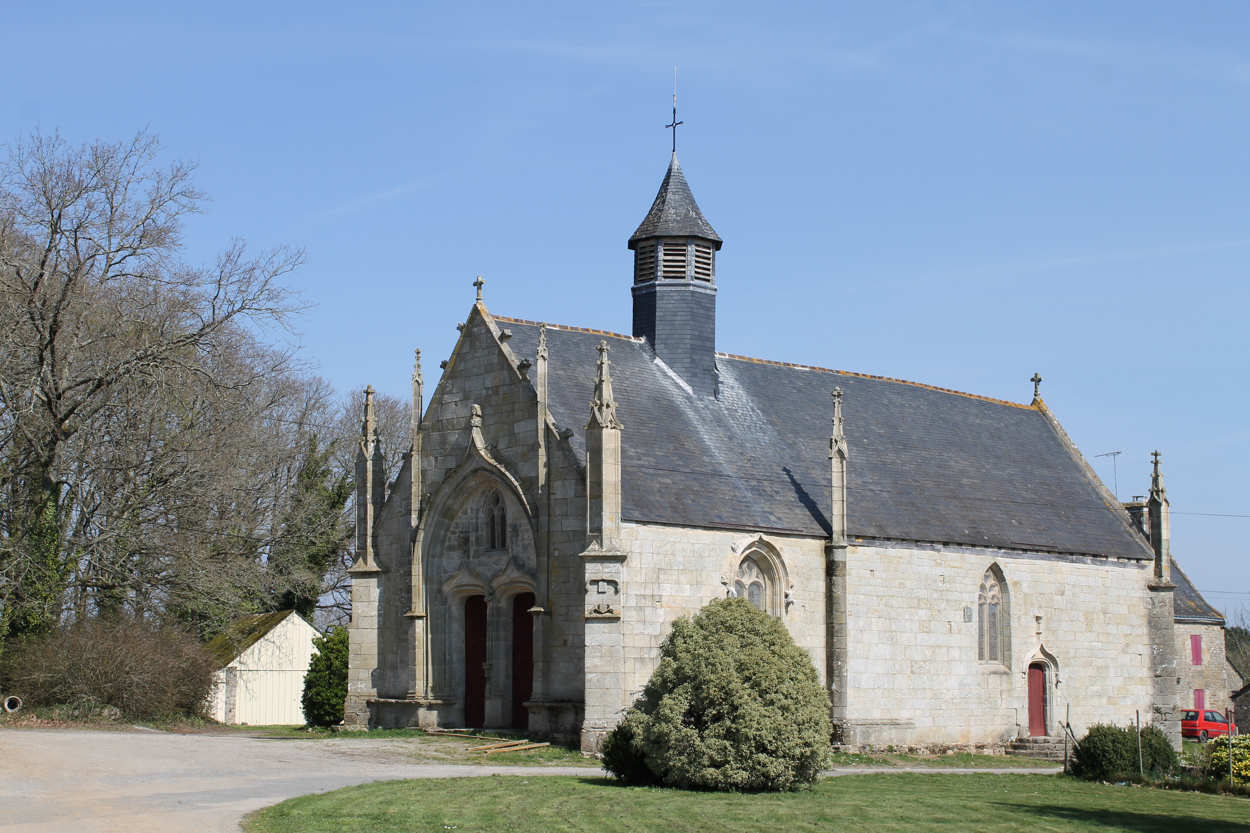 Chapelle Notre-Dame-des-Vertus à Berric (Morbihan). .